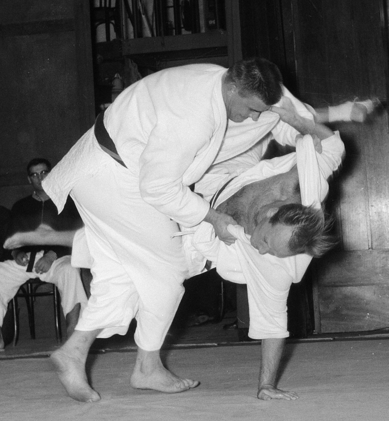 Anton Geesink (links) en Willem Dadema